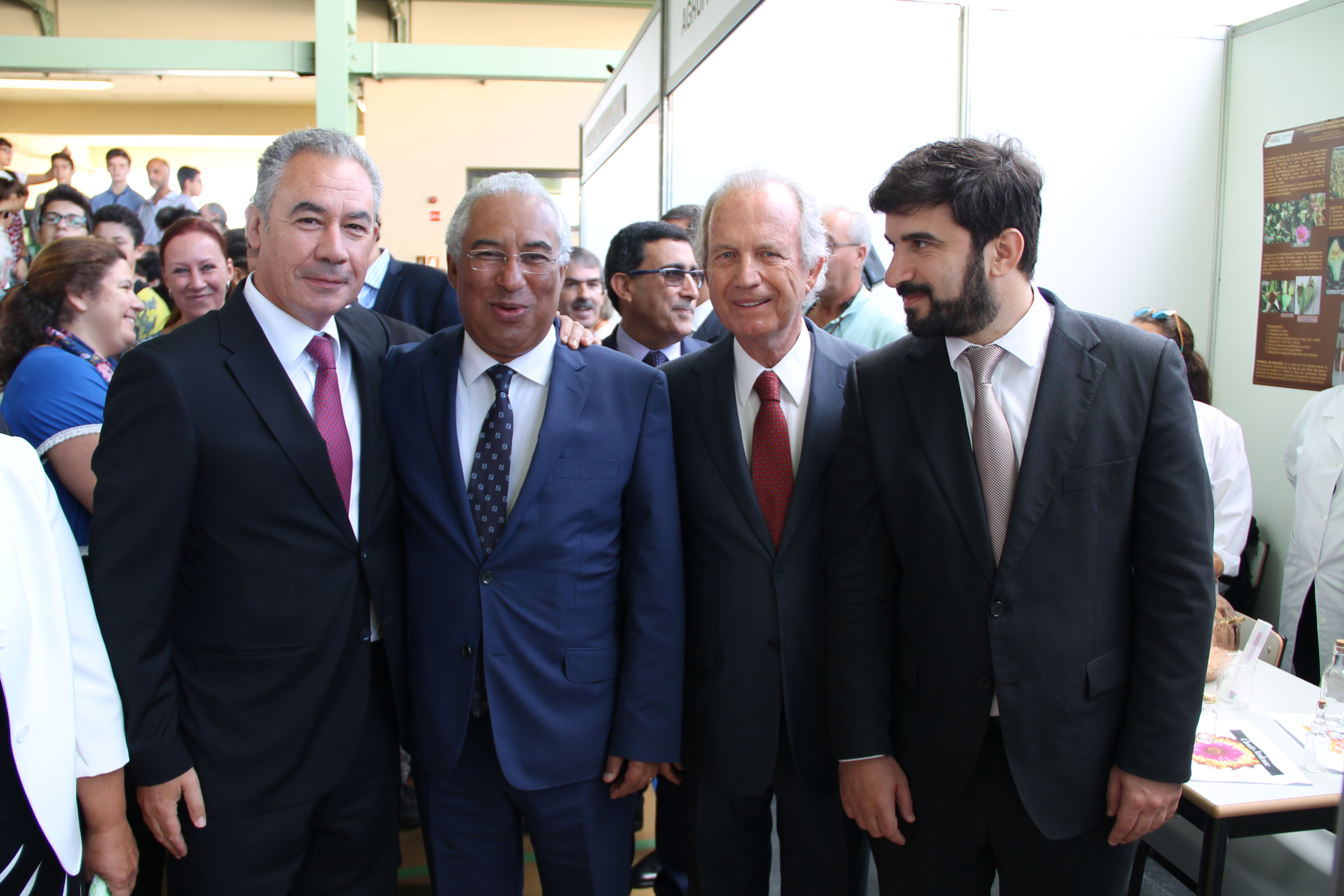 Mostra Nacional dos Prémio Fundação Ilídio Pinho "Ciência na Escola", Pinhal Novo, Palmela, 2016